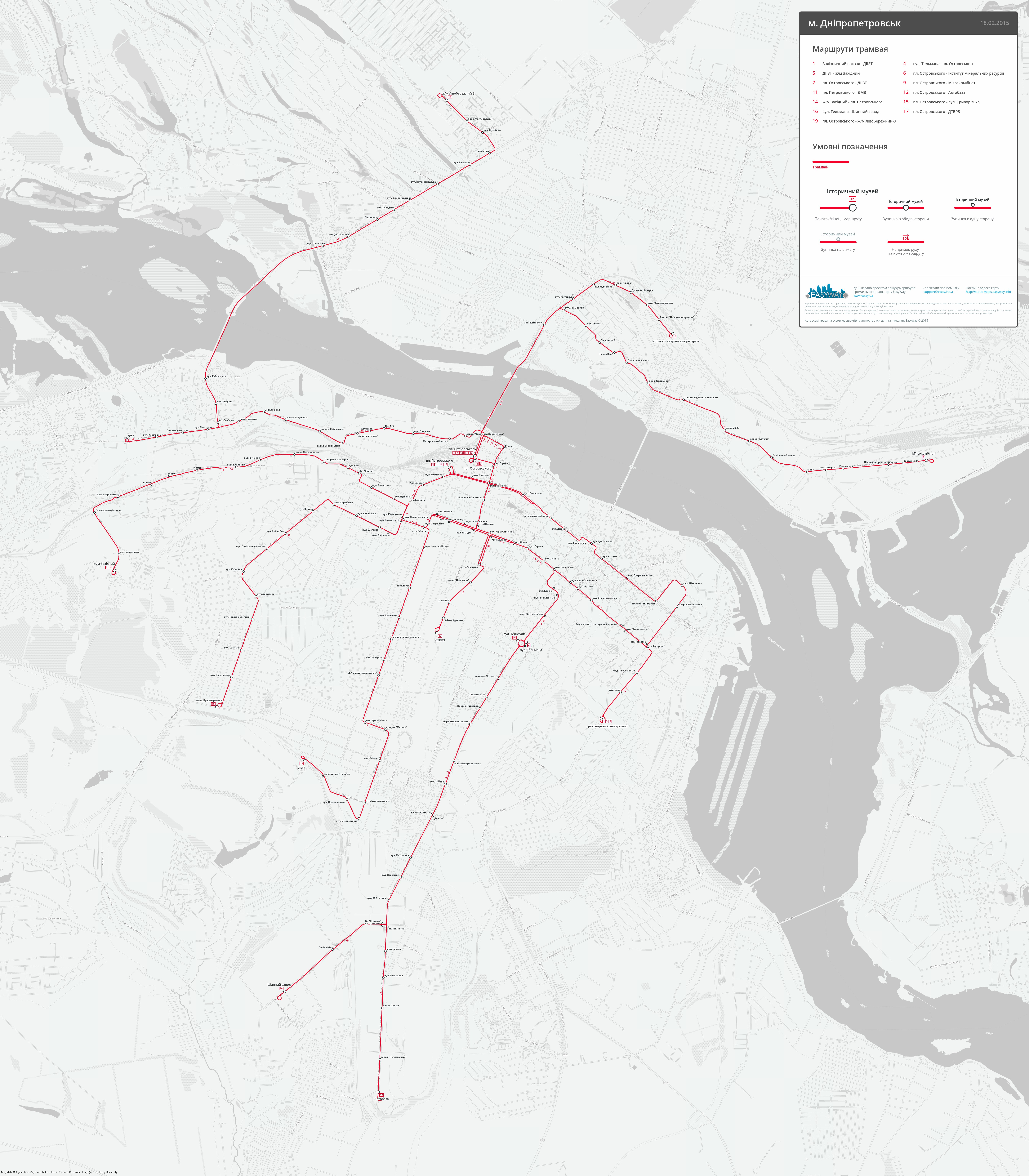 Схема трамвайних маршрутів у місті Дніпропетровськ